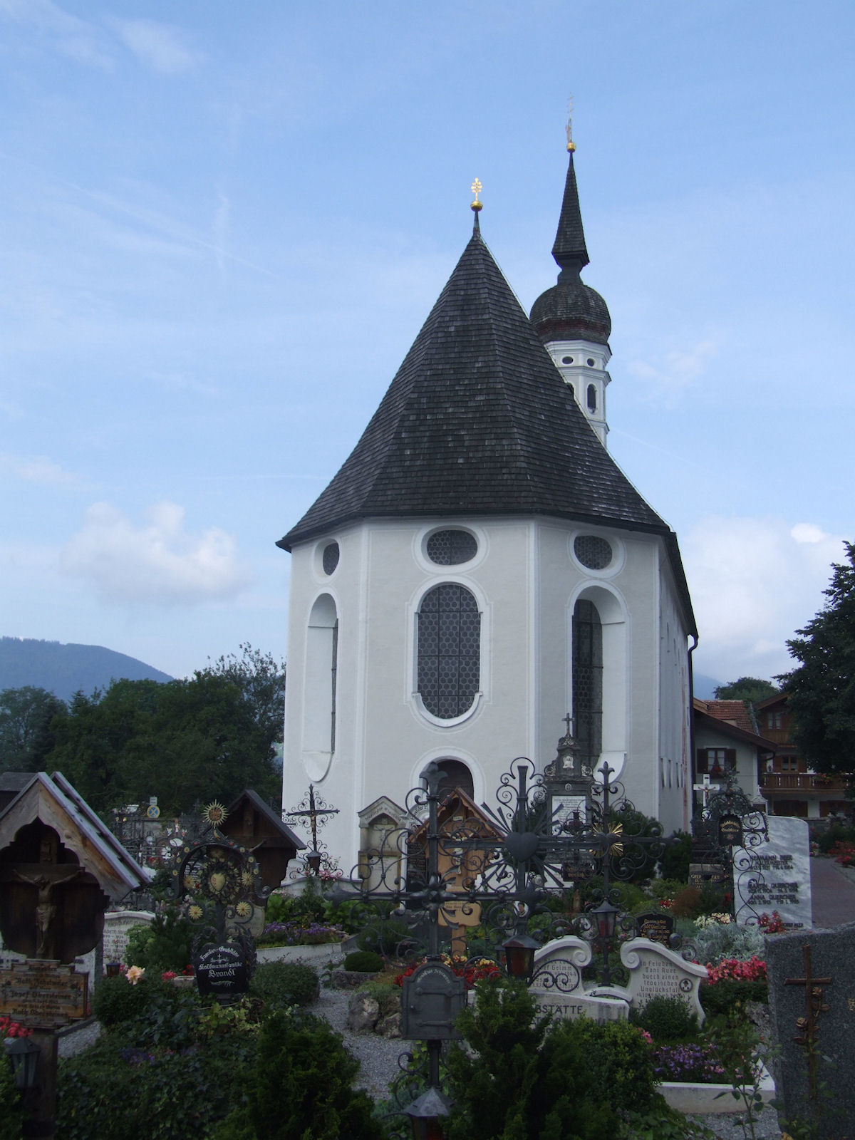 Cemetry chapel of the Holy Blood Native nameFriedhofskapelle Heilig-BlutLocationElbach bei Fischbachau, Upper Bavaria, GermanyCoordinates47° 44′ 29.64″ N, 11° 57′ 05.86″ E ชาเปลพระโลหิตอันศักดิ์สิทธิ์ ในสุสานนอกวัดเซนต์แอนดรู, เอลบาค, ฟิชคบาคเคา, บาวาเรีย, เยอรมนี Friedhofskirche Heiligen Blut, Pfarrkirche St. Andreas, Elbach, Fischbachau im Landkreis Miesbach, Deutschland Chapel of the Holy Blood, Church of St. Andrews Elbach, Fischbachau, Miesbach, Bavaria, Germany